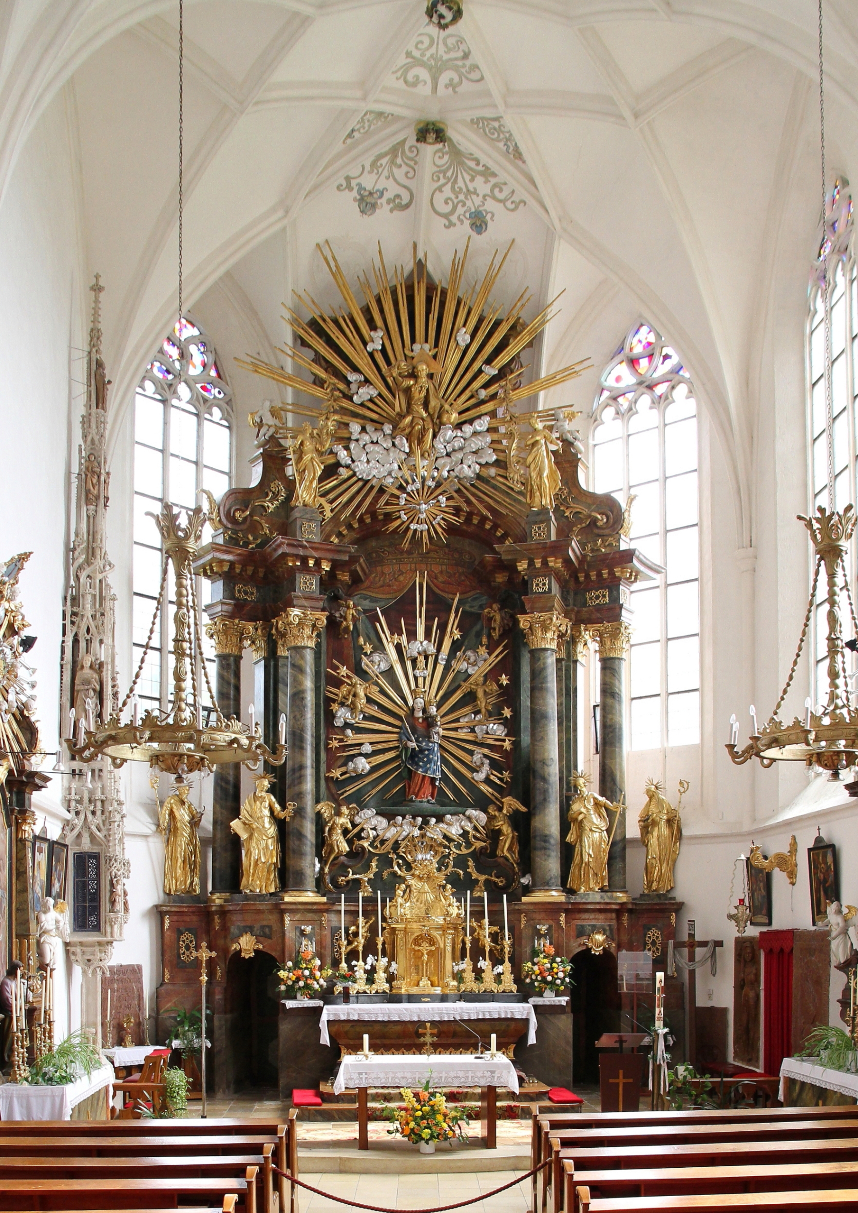 Hochbarocker Hochaltar der katholischen Pfarrkirche Mariae Namen in Mauer bei Melk, ein Ortsteil der niederösterreichischen Gemeinde Dunkelsteinerwald. Links das etwa 10 Meter hohe gotische Sakramenthäuschen aus dem Jahr 1506.